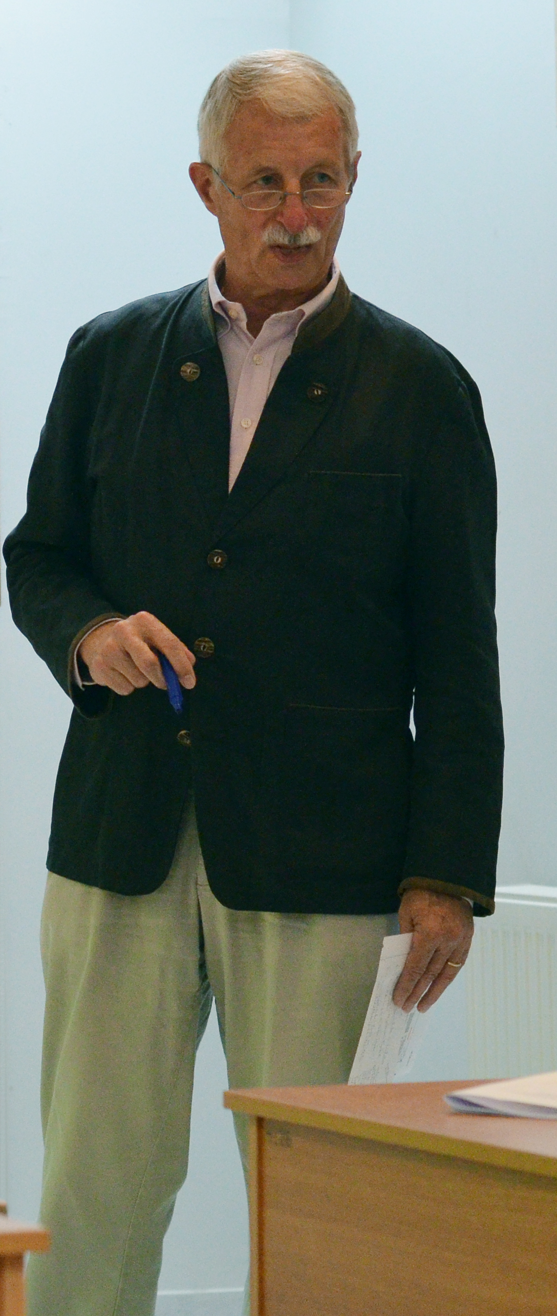 Фолькер Ронге, 2012 год